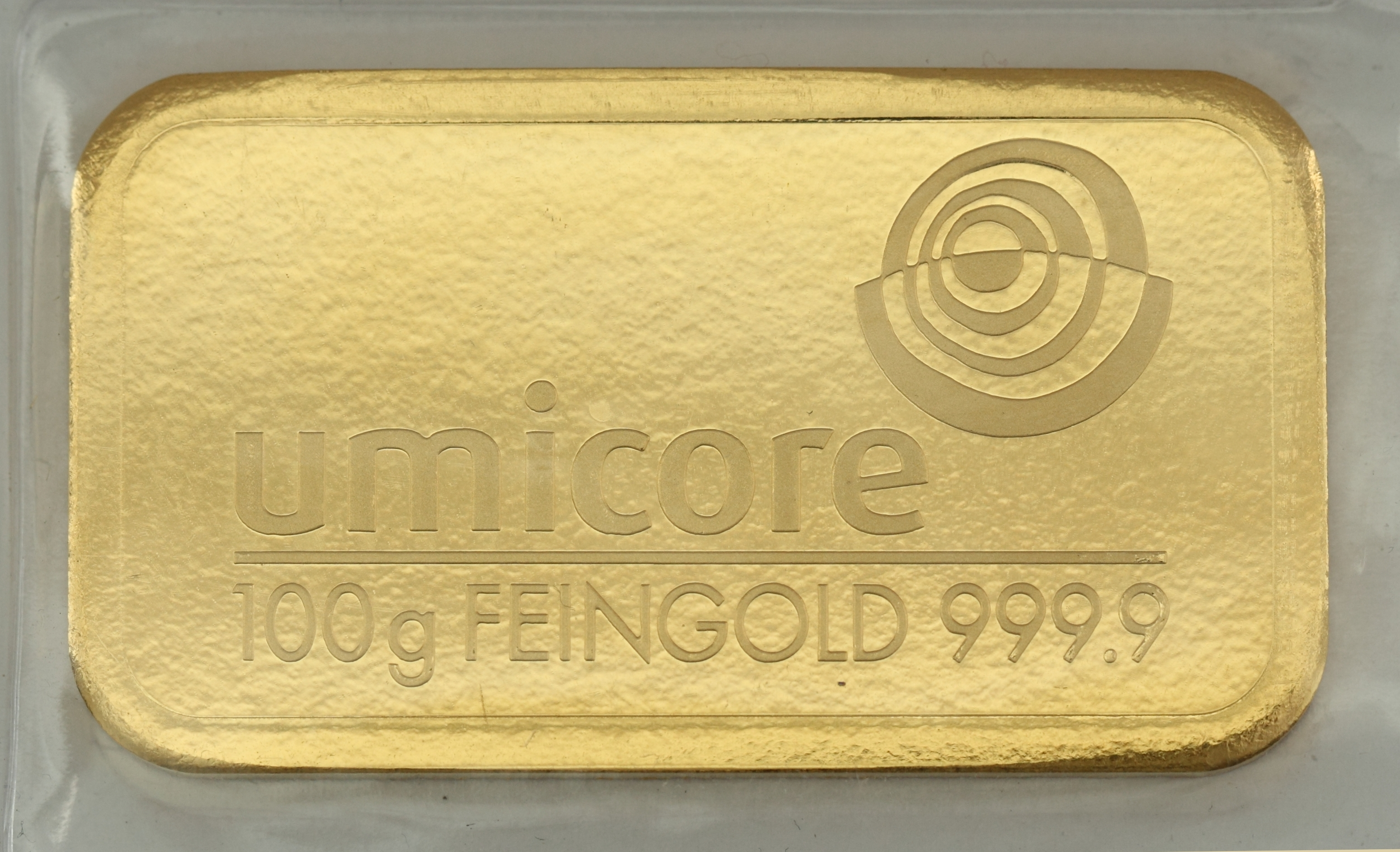 Ein Barren Feingold mit einem Reinheitsgrad von 999,9 Promille und einem Gewicht von 100 Gramm, hergestellt von Umicore